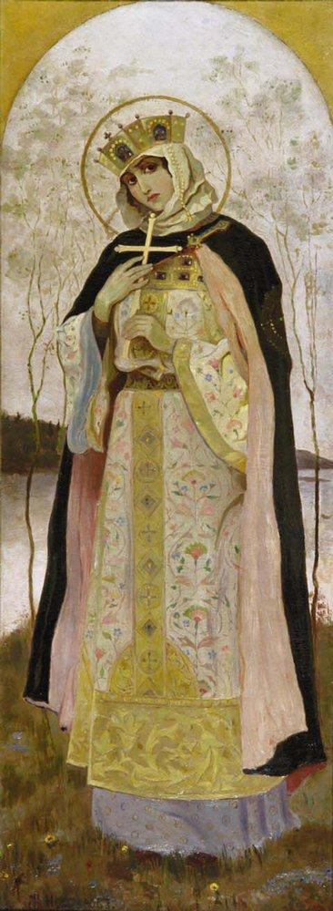 St. Olga. Святая княгиня Ольга. Эскиз росписи собора Св. Владимира в Киеве Холст, масло. 104x39.5 см. Частное собрание.